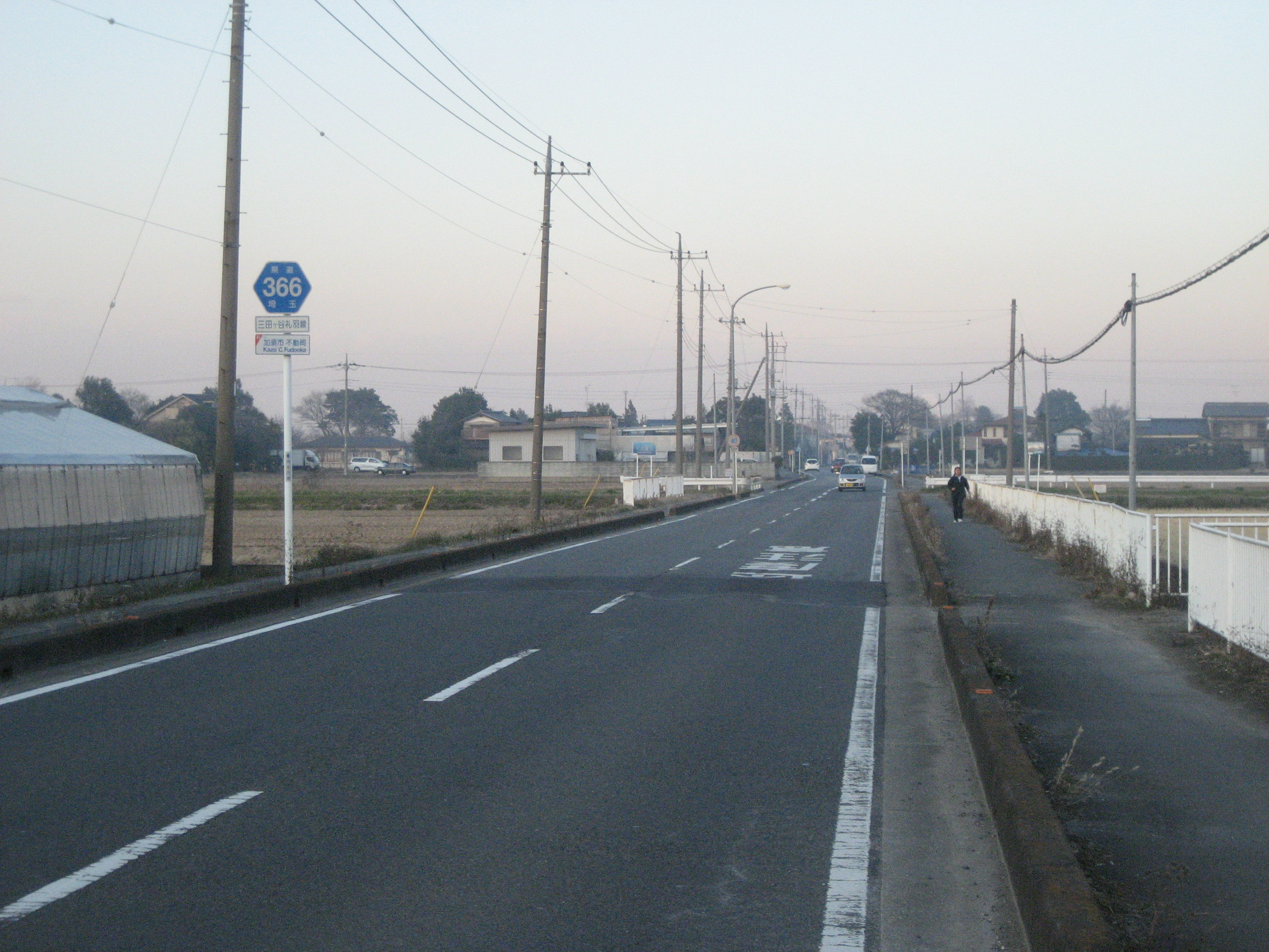 埼玉県道366号線加須市内